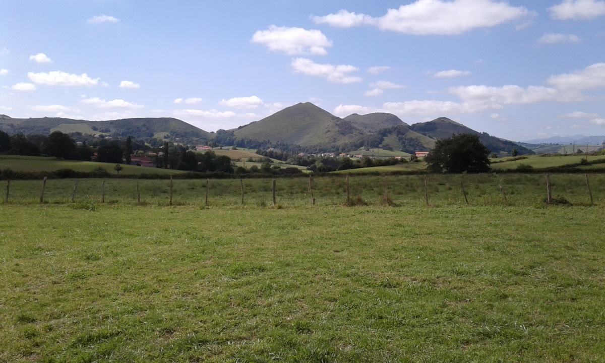 Campagne autour du village basque de Saint Martin d'Arberoue